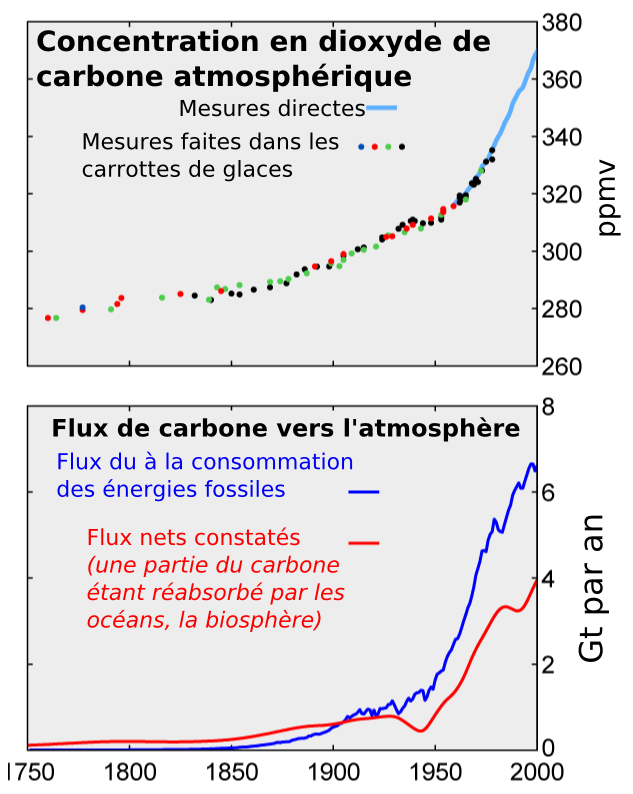 flux de carbone depuis 1750